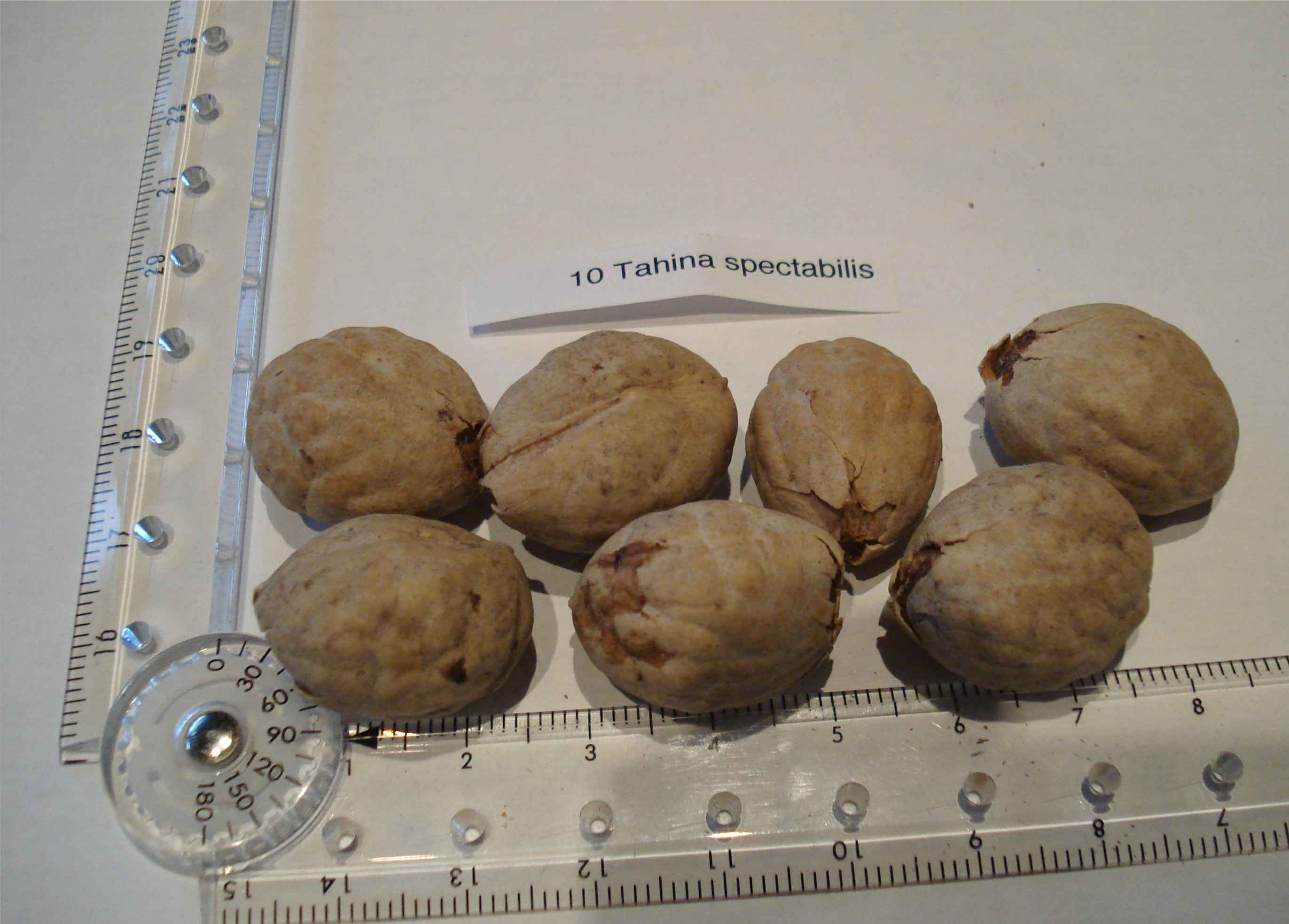 Graines du Palmier Tahina spectabilis (chez moi !)